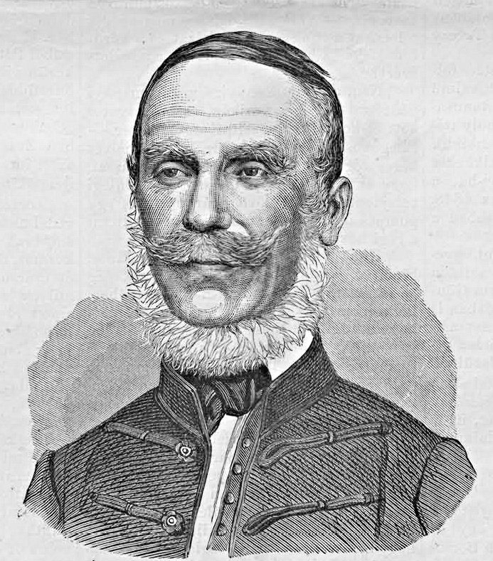 Bocsor István (1807–1885) a Pápai Református Kollégium történelemtanára 1837-1885 között (Vasárnapi Ujság, 1871. augusztus 27.)